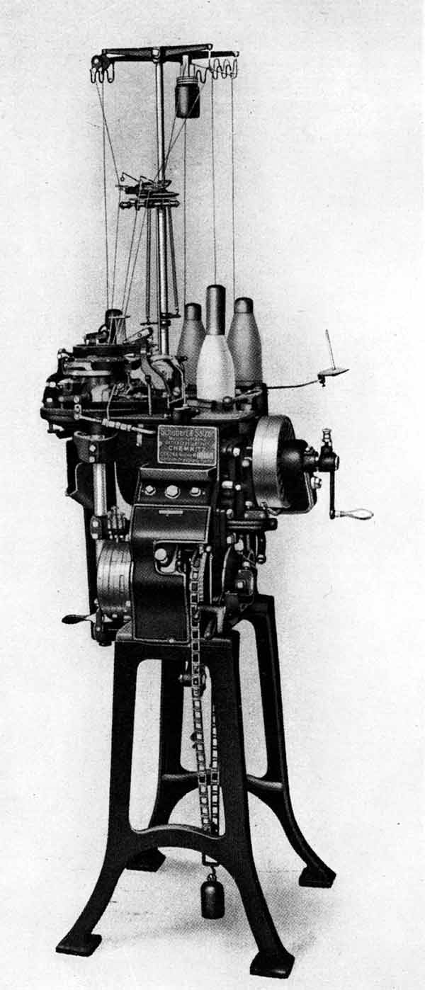 Rundstrickmaschine für Strümpfe